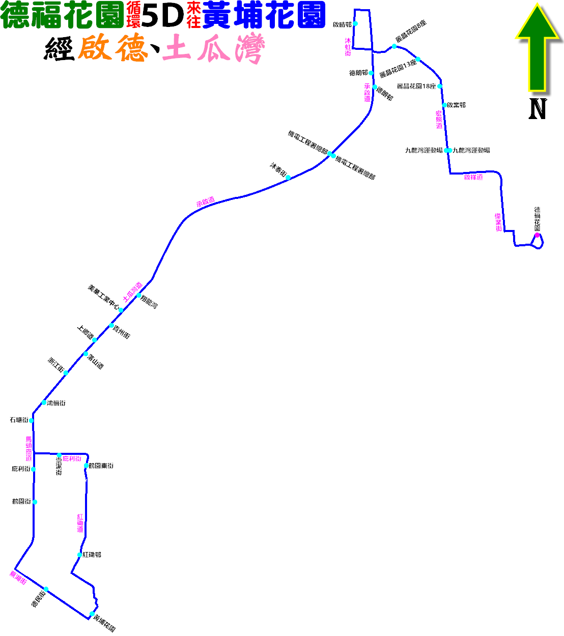 中文（香港）: 九巴5D線的走線圖